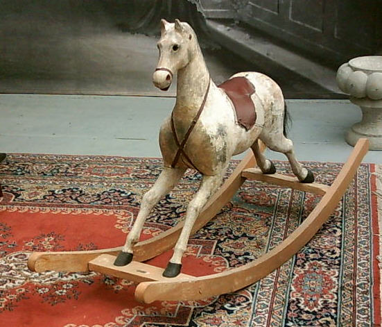 Antikes Schaukelpferd